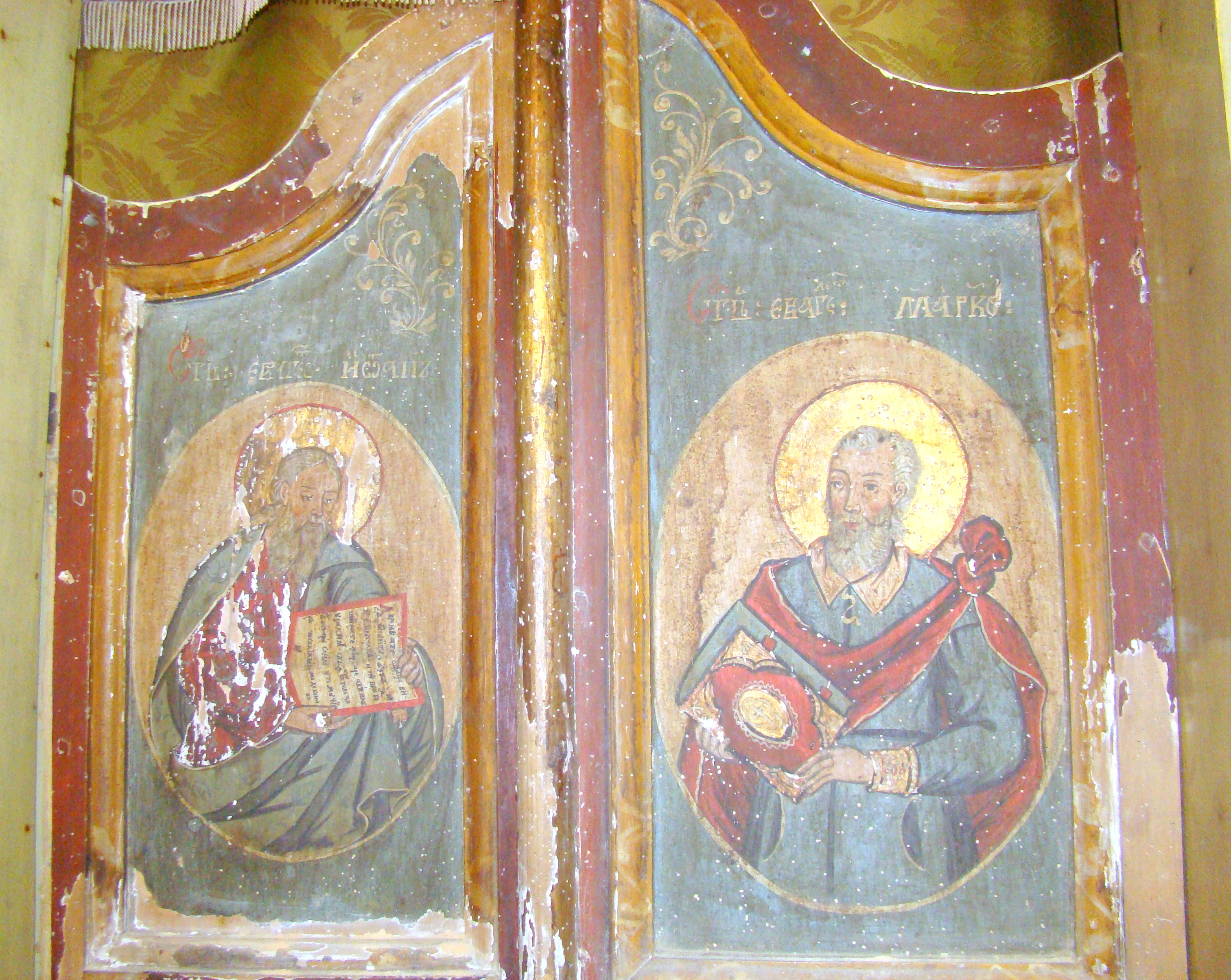 Biserica de lemn „Adormirea Maicii Domnului” din Tiulești-Hunedoara